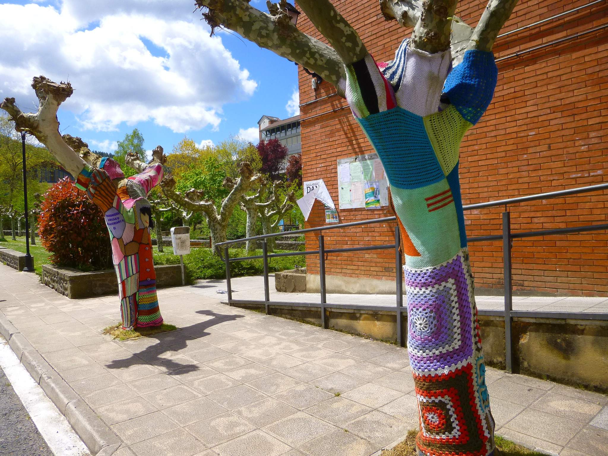 Yarn bombing (o knitted graffiti, graffiti de punto) en Ibarra de Aramayona (Aramaio), en Álava